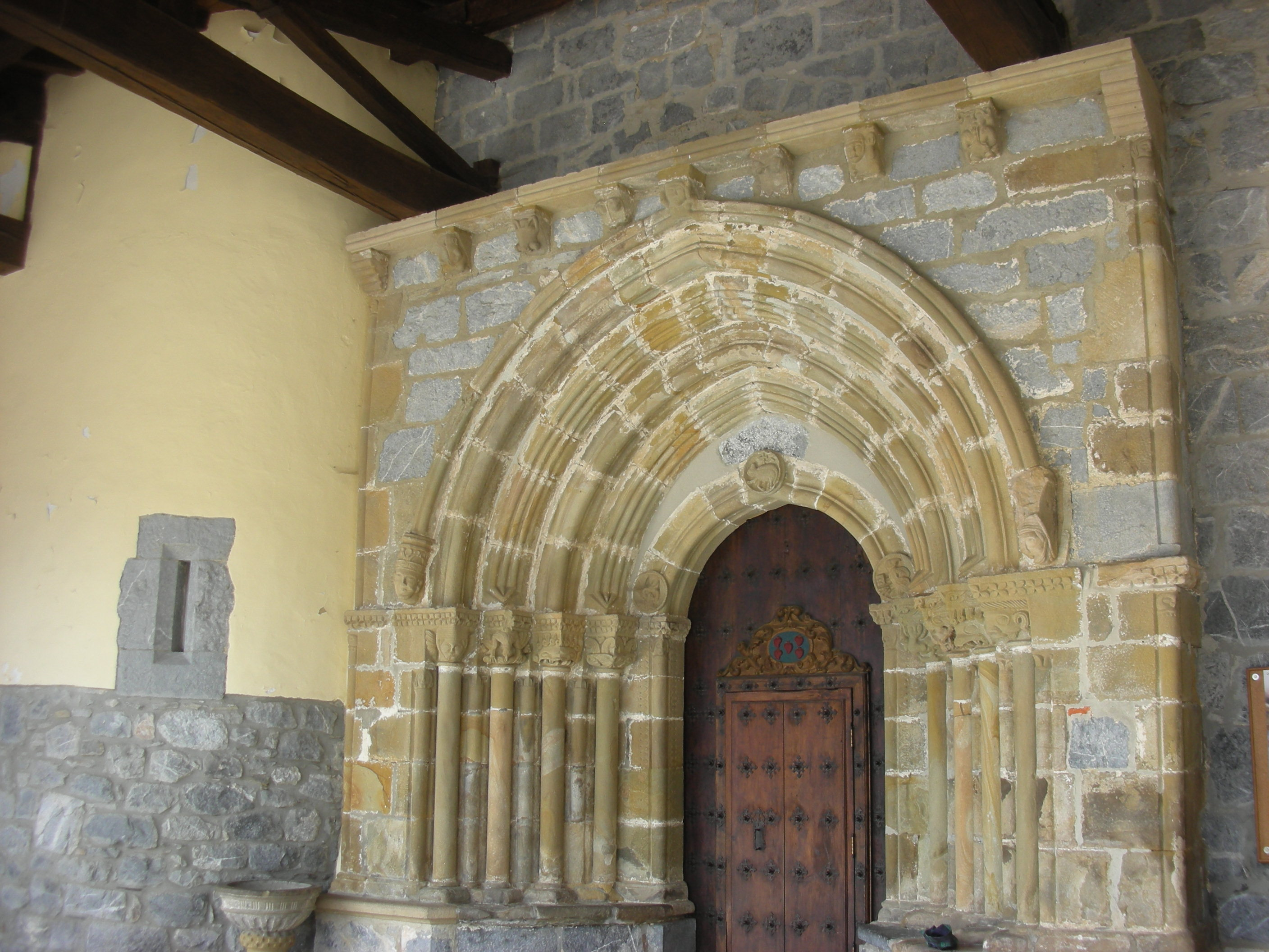 Portada de la parroquia de San Pedro (s XIV), en Betelu, Navarra, España.